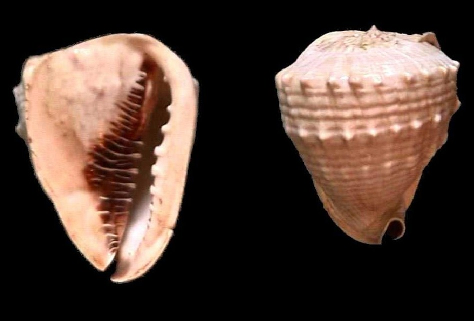 Cassis madagascarensis del Archipiélago Los Roques, Dependencias Federales - Venezuela.